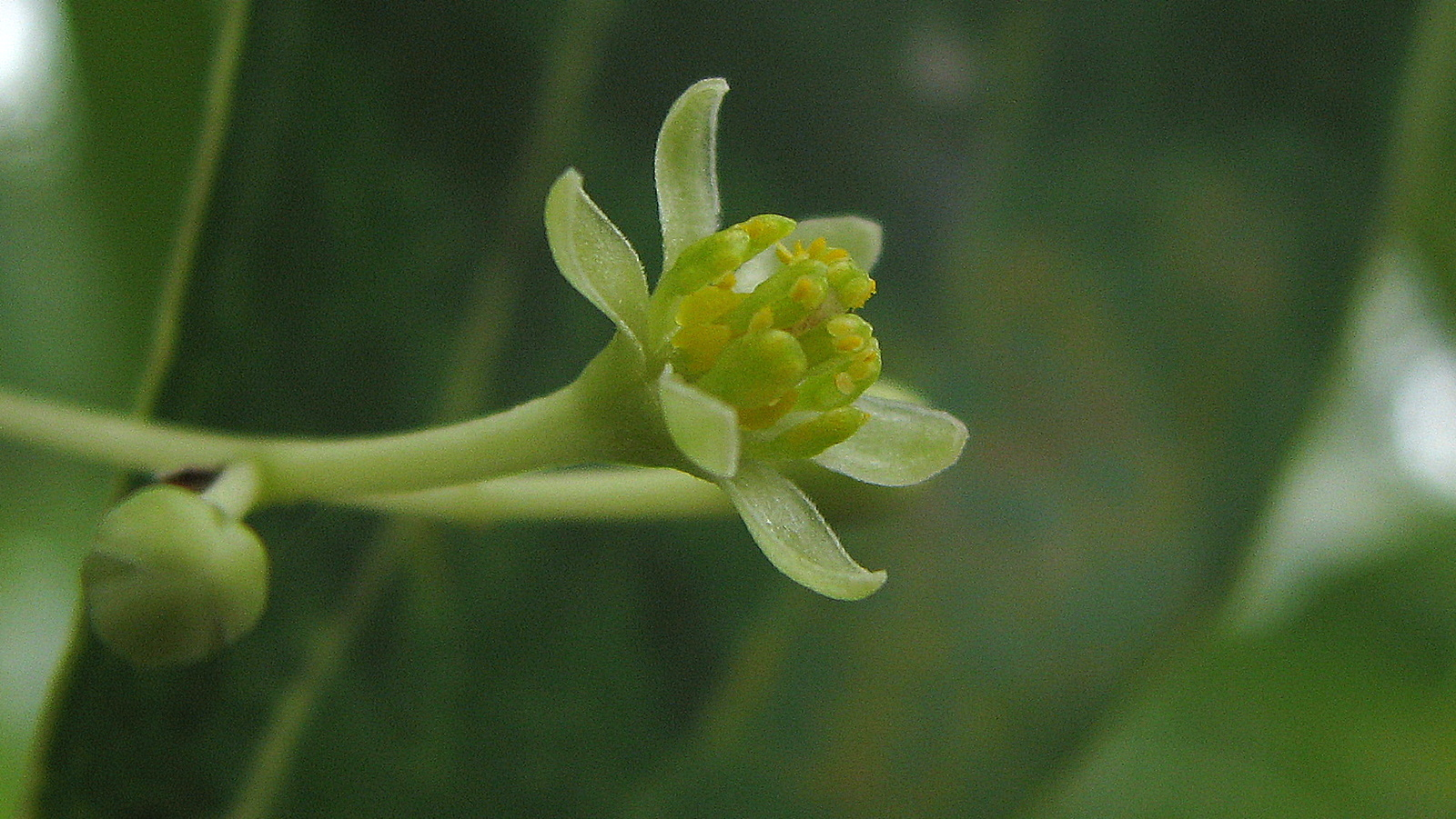 Cinnamomum iners Reinw. ex Blume